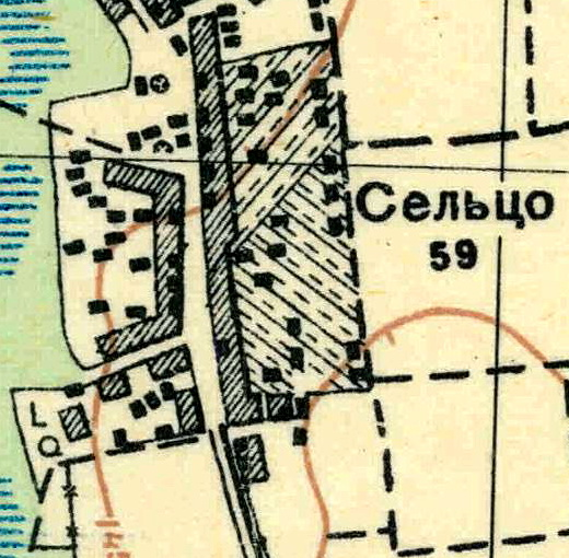 Топографическая карта Ленинградской области, квадрат О-35-24-А-а (Клясина), деревня Сельцо